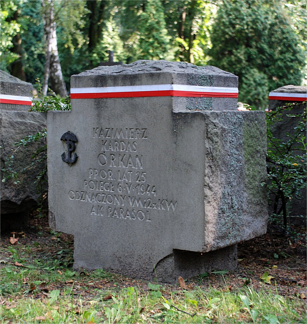 Grób Kazimierza Kardasia Powązkach Wojskowych w Warszawie